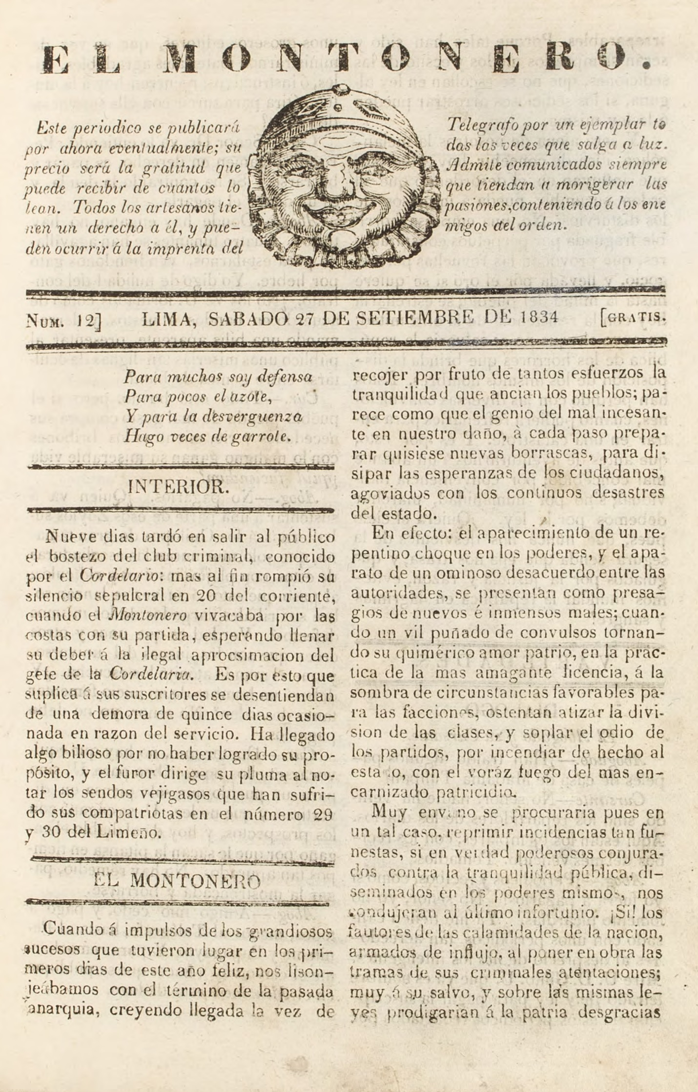 Carátula del periódico de distribución gratuita El Montonero, Perú; imagen obtenida del repositorio digital de la Pontiificia Universidad Católica del Perú.